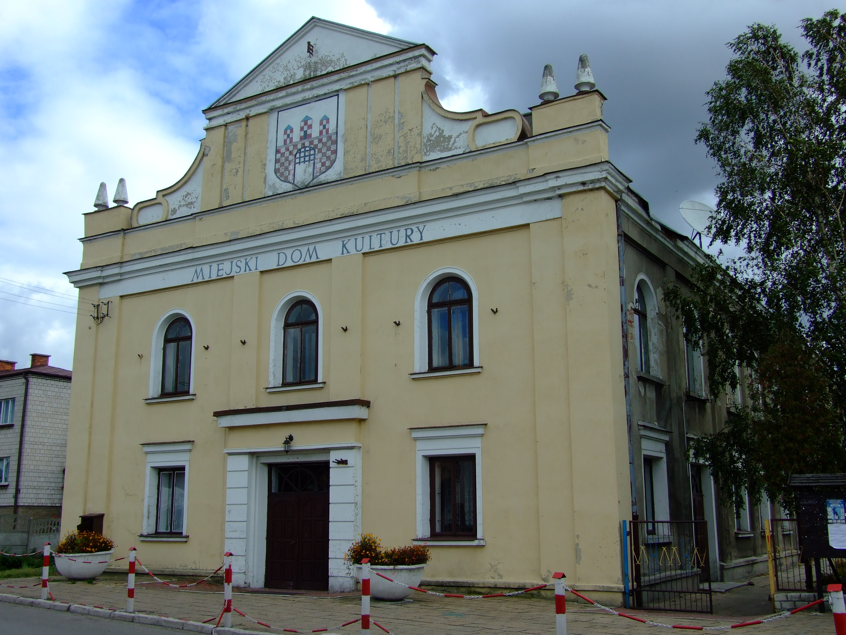 Kulturhaus in Żarki, früher Gebäude der Synagoge